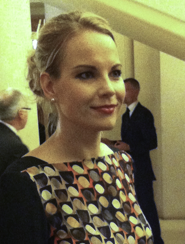 Paris 13102012